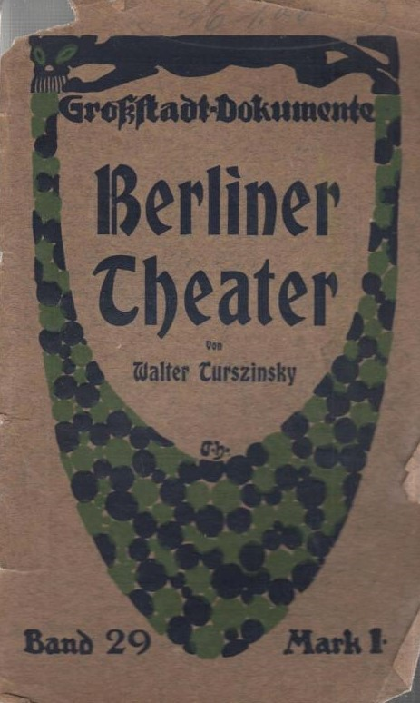 Walter Turszinsky: Berliner Theater. Berlin: Hermann Seemann Nachfolger, c. 1906 Großstadt-Dokumente Band 29, hrsg. von Hans Ostwald